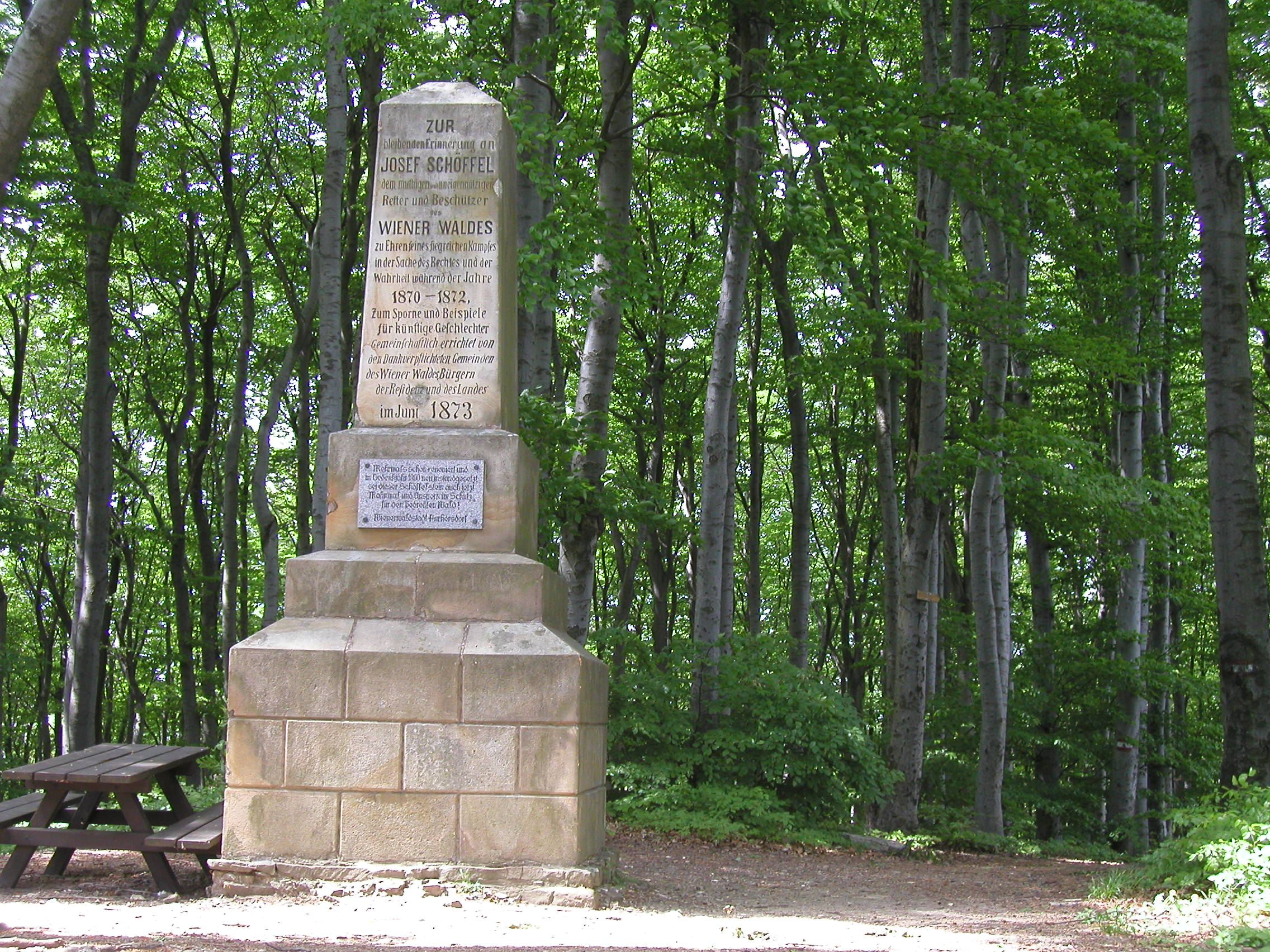 Schöffelgedenkstein (Naturpark Sandsteinwienerwald).